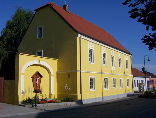 Ansicht von der Hauptstraße, Rabensburg, Niederösterreich